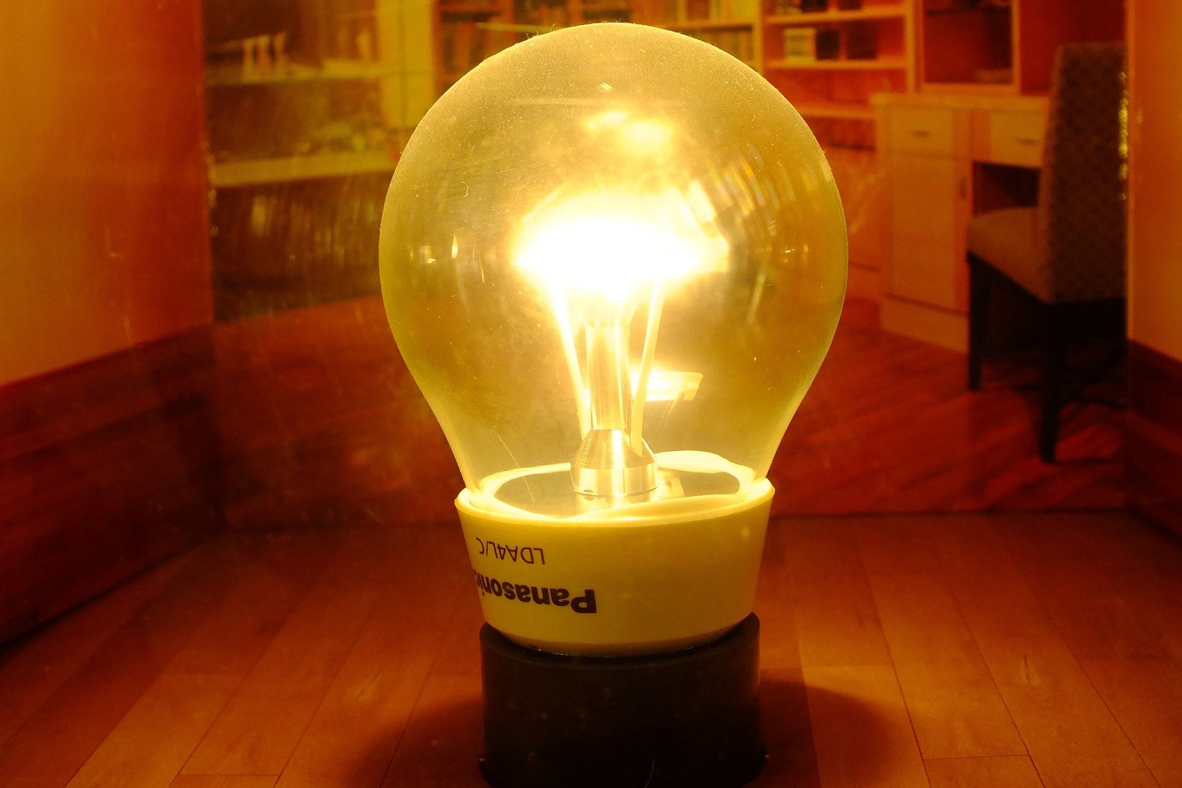 Panasonic LDA4L/C パナソニックLEDはだか電球タイプ